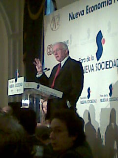 Teddy Bautista, presidente del Consejo de Dirección de la Sociedad General de Autores y Editores (SGAE), en un desayuno organizado por Foro de Nueva Economía.